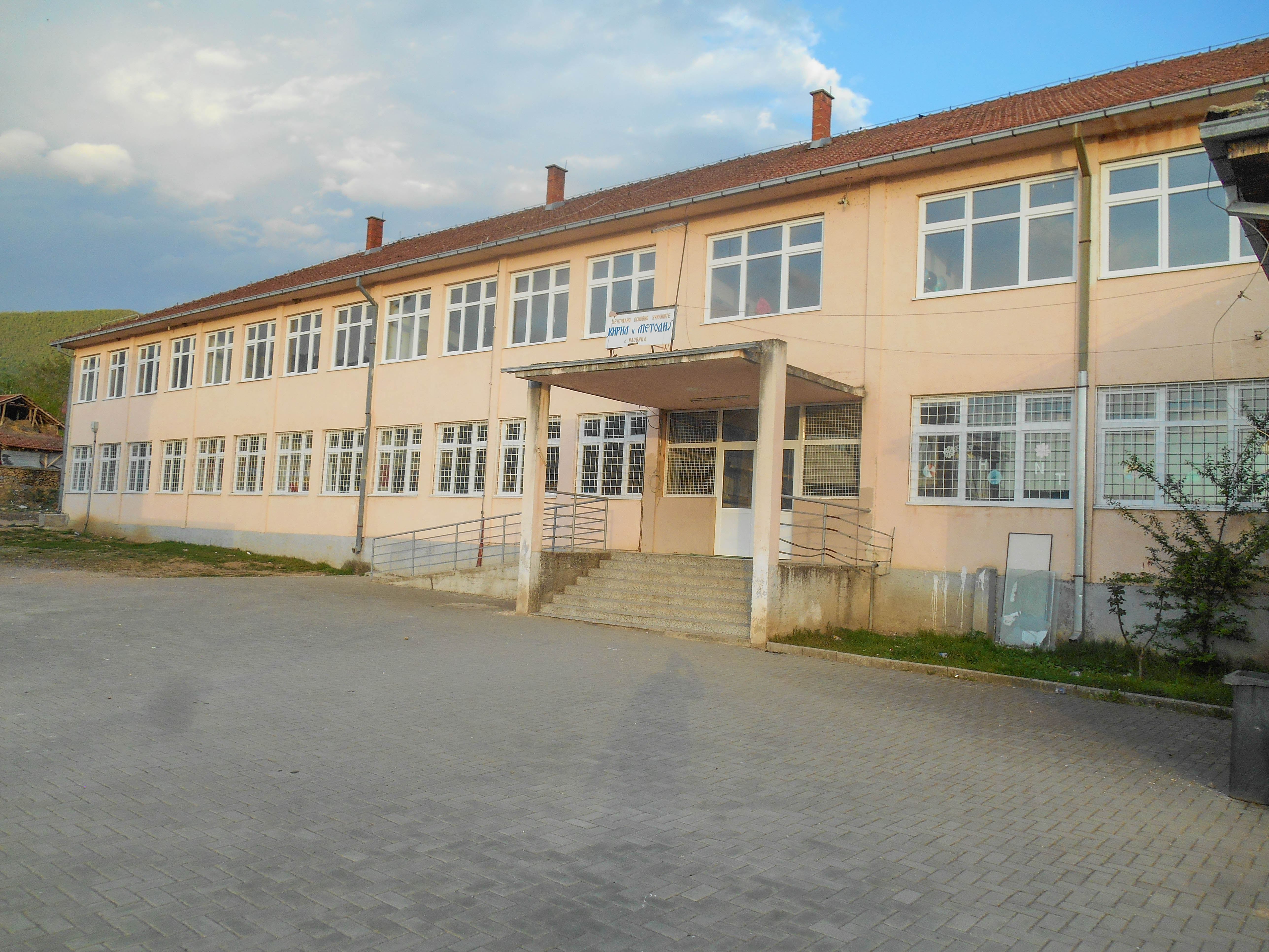 Основно училиште „Св. Кирил и Методиј“ - Иловица